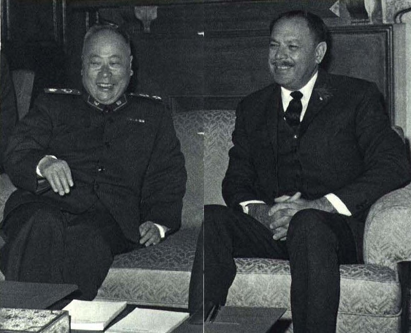 1965-6 1965年 陈毅访问巴基斯坦总统阿尤布·汗